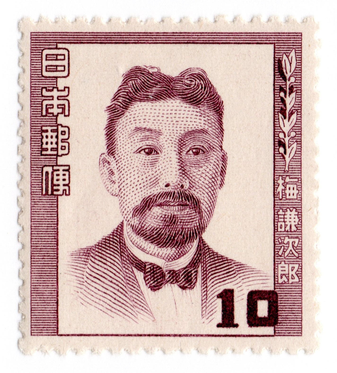 梅謙次郎 文化人切手 1952年発行